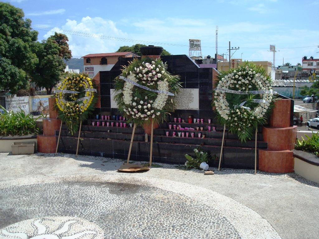 Plaza de la Esperanza 9 de Octubre, conocida también como Monumento a los caídos, en honor a las víctimas del Huracán Paulina en su paso por la ciudad de Acapulco, México la madrugada del 9 de octubre de 1997. Ofrendas y velas a diez años de la tragedia adornan la placa que reza Somos una familia hermanados por la ciudad, que vive, que ha vivido, que vivirá. Se ubica sobre la Avenida Cuauhtémoc de la ciudad en el puente del río del Camarón, corriente que causó la muerte de muchas personas.